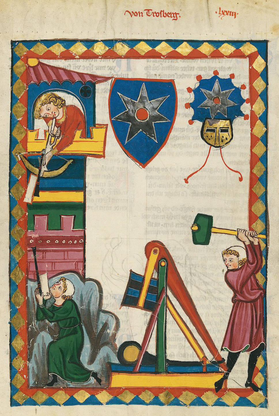 Codex Manesse, UB Heidelberg, Cod. Pal. germ. 848, fol. 255r: Von Trostberg